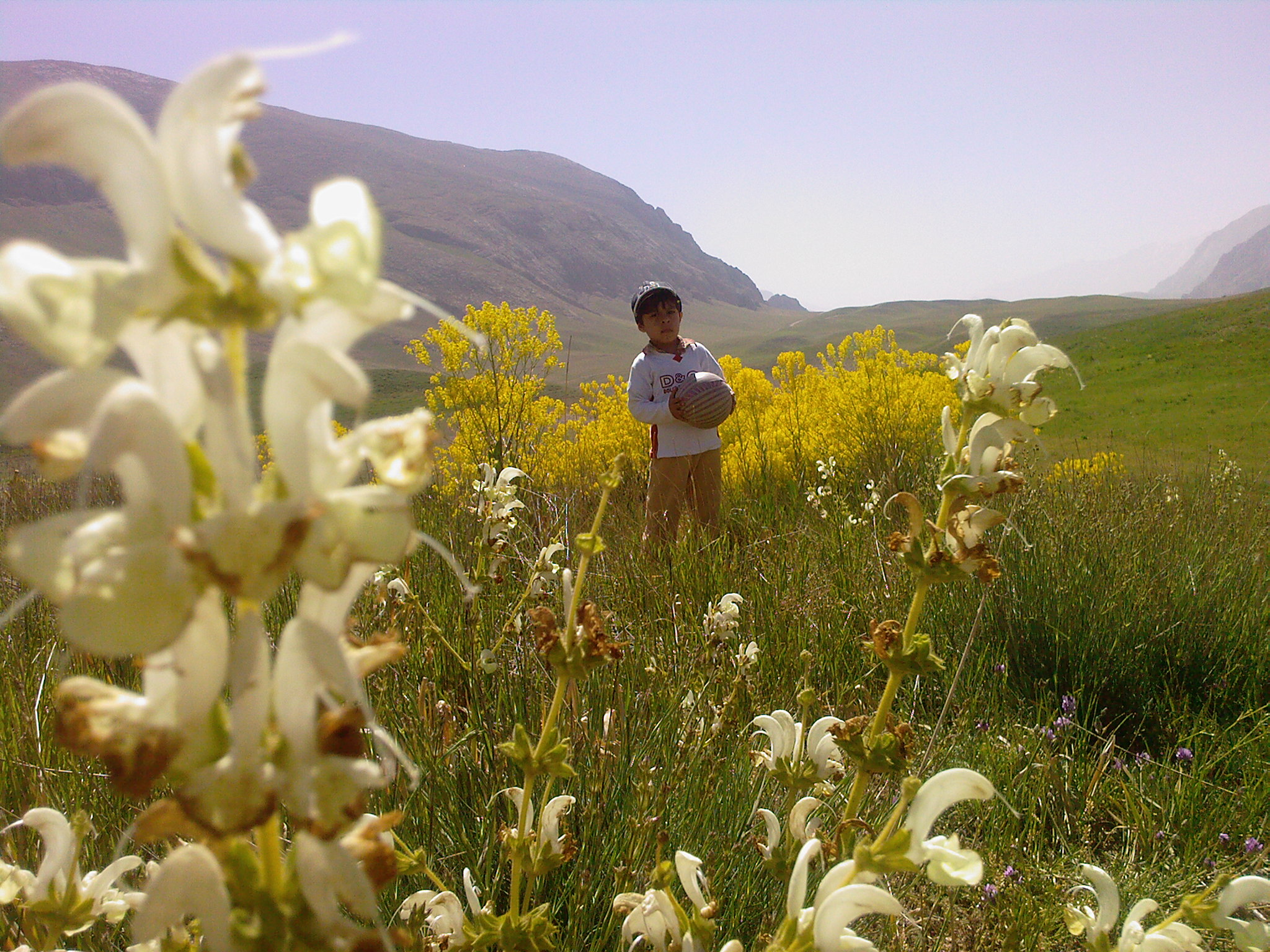 Flower 1, Lar Dam درمیان گلها